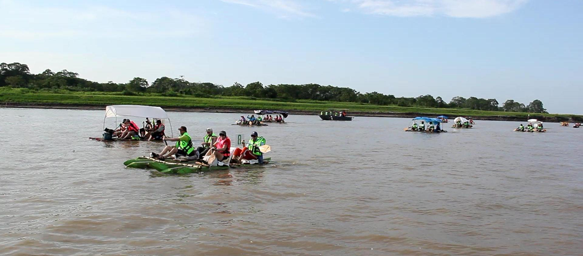 Carrera Internacional de Balsas realizada por Iquitos el 2012.